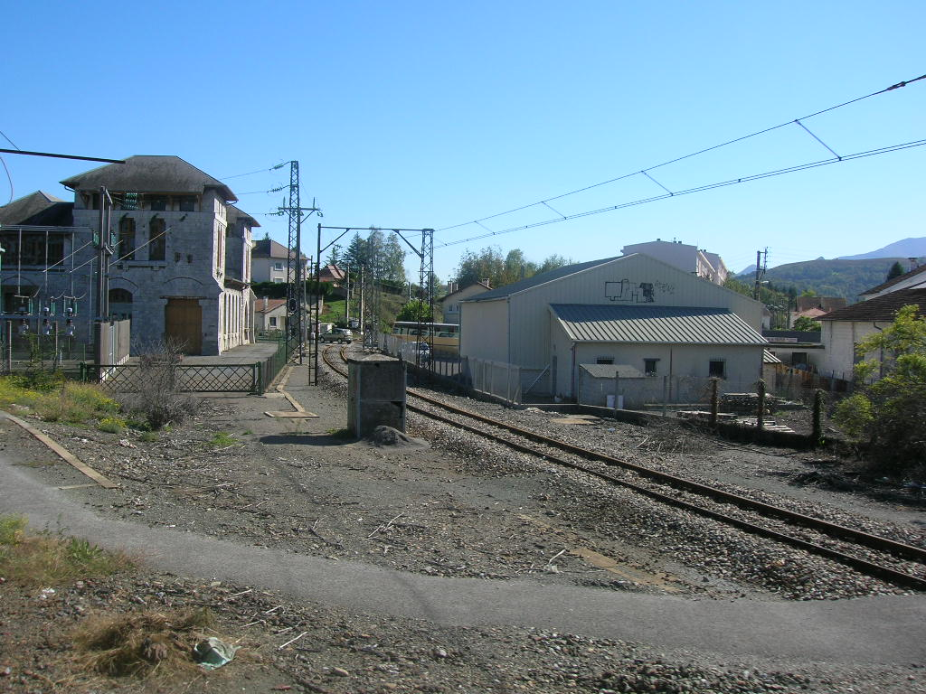 La linea verso Pierrefitte-Nestalas